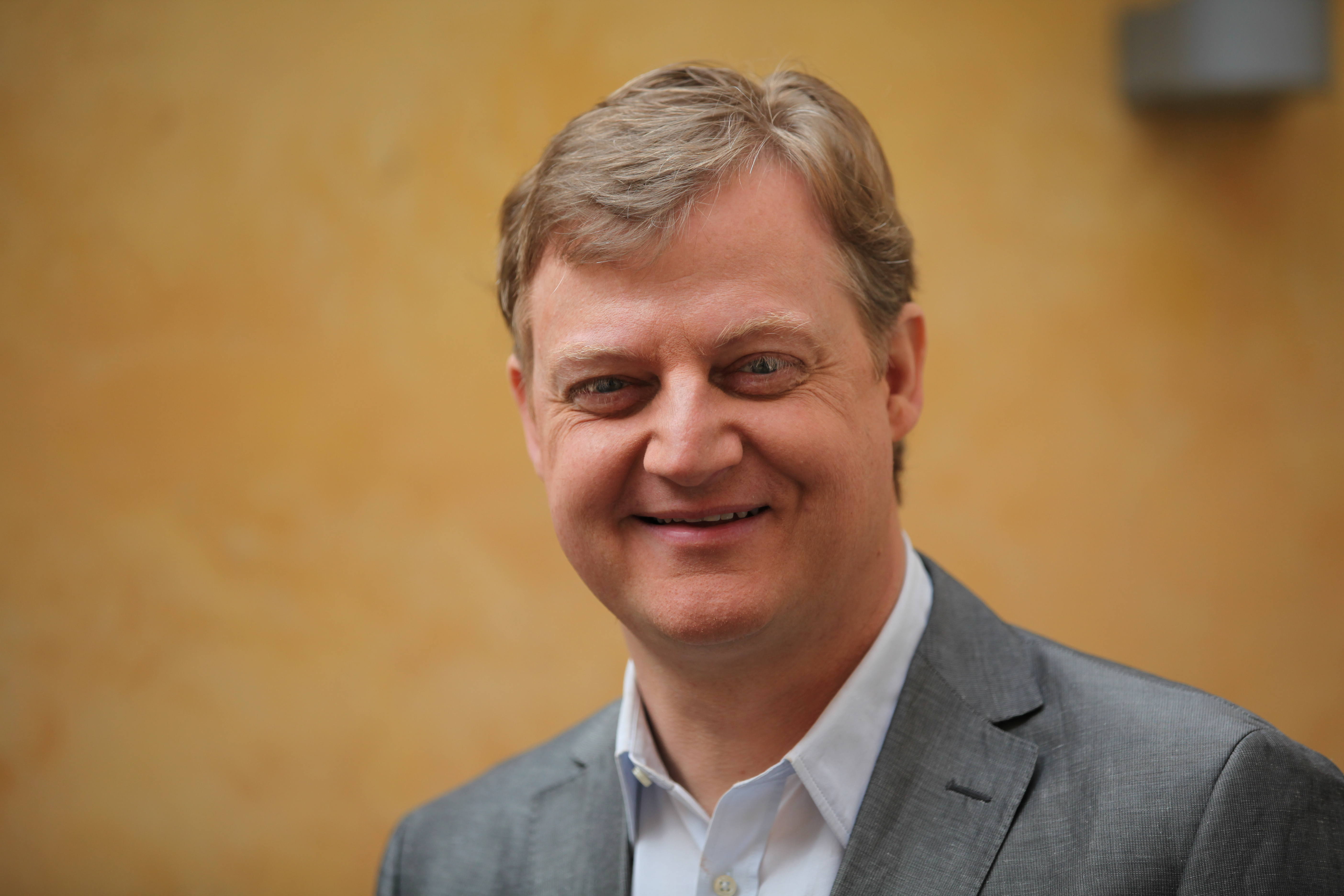 Jörg Schieb (Privataufnahme)